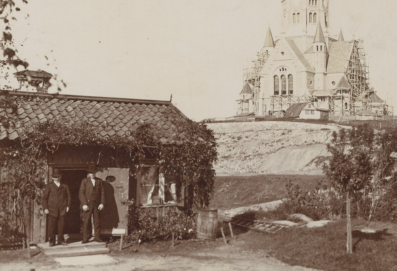 Vita bergens jaktstuga, sedermera Ceders Café.